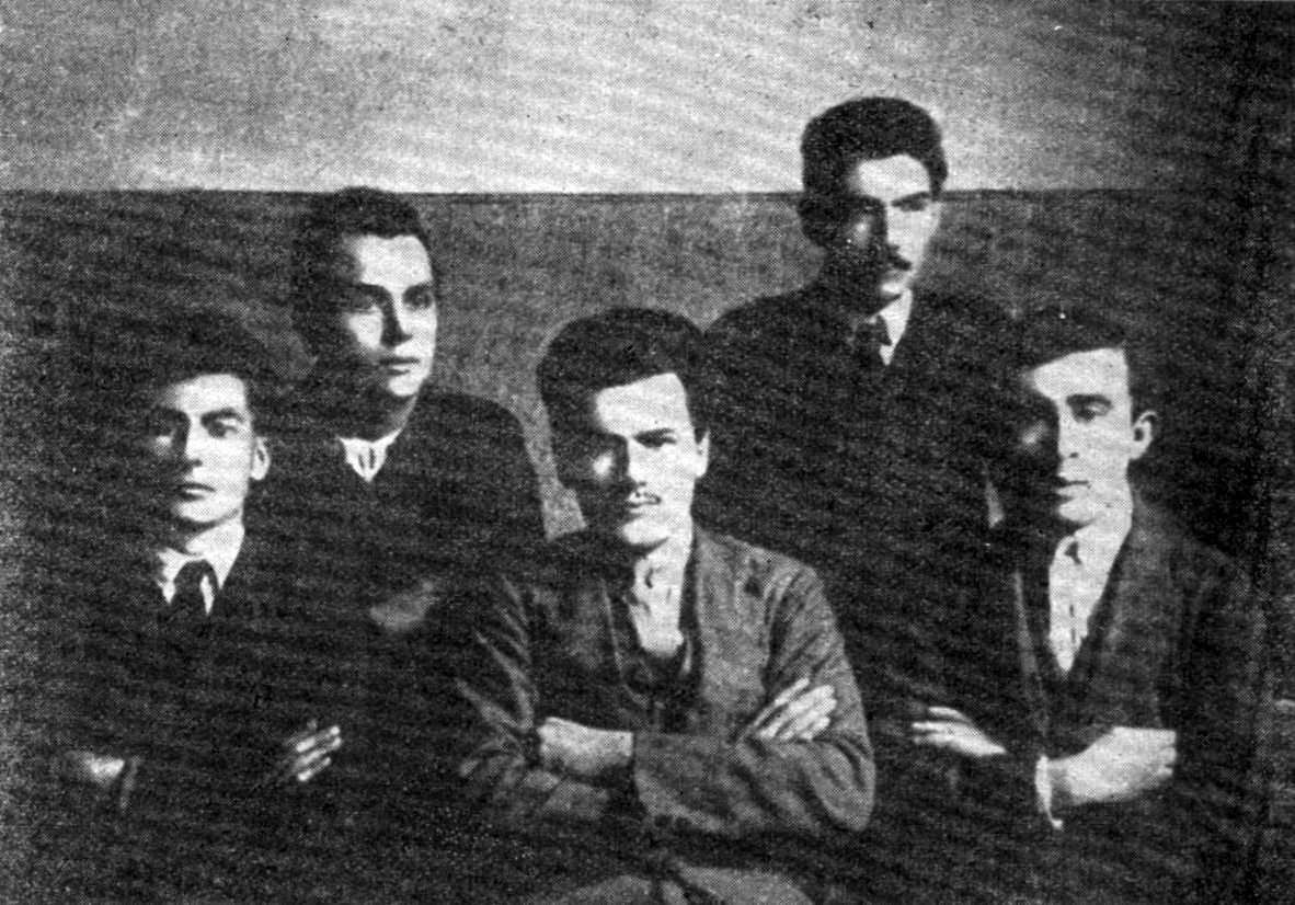 Srpskohrvatski / српскохрватски: "Crvena pravda" u Zagrebu koja je sebi stavila u zadatak da se obračunava sa tvorcima zloglasne Obznane. S leva na desno: Alija Alijagić, Nikola Petrović, Rodoljub Čolaković, Stevo Ivanović i Dinko Lopandić.